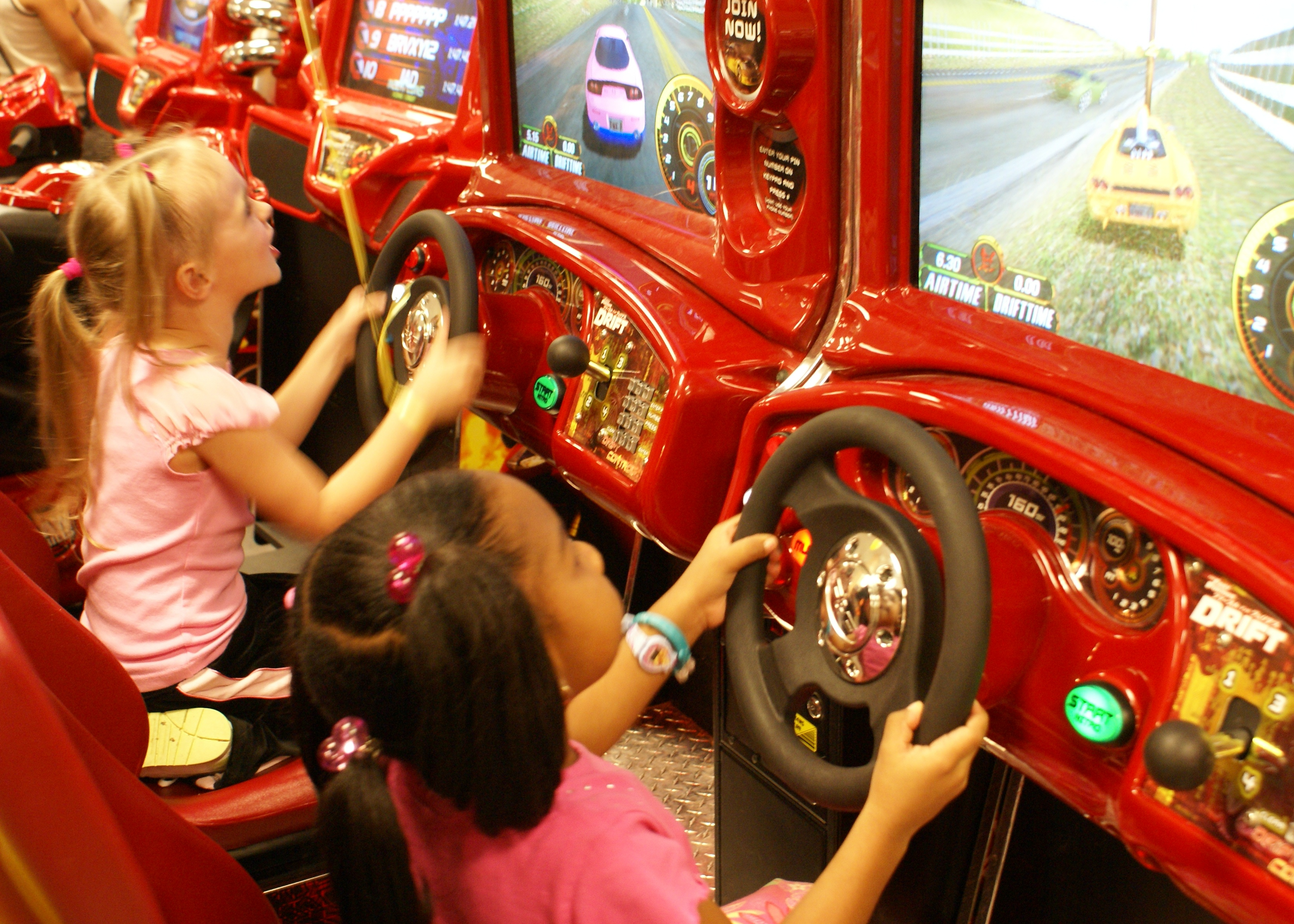 Games